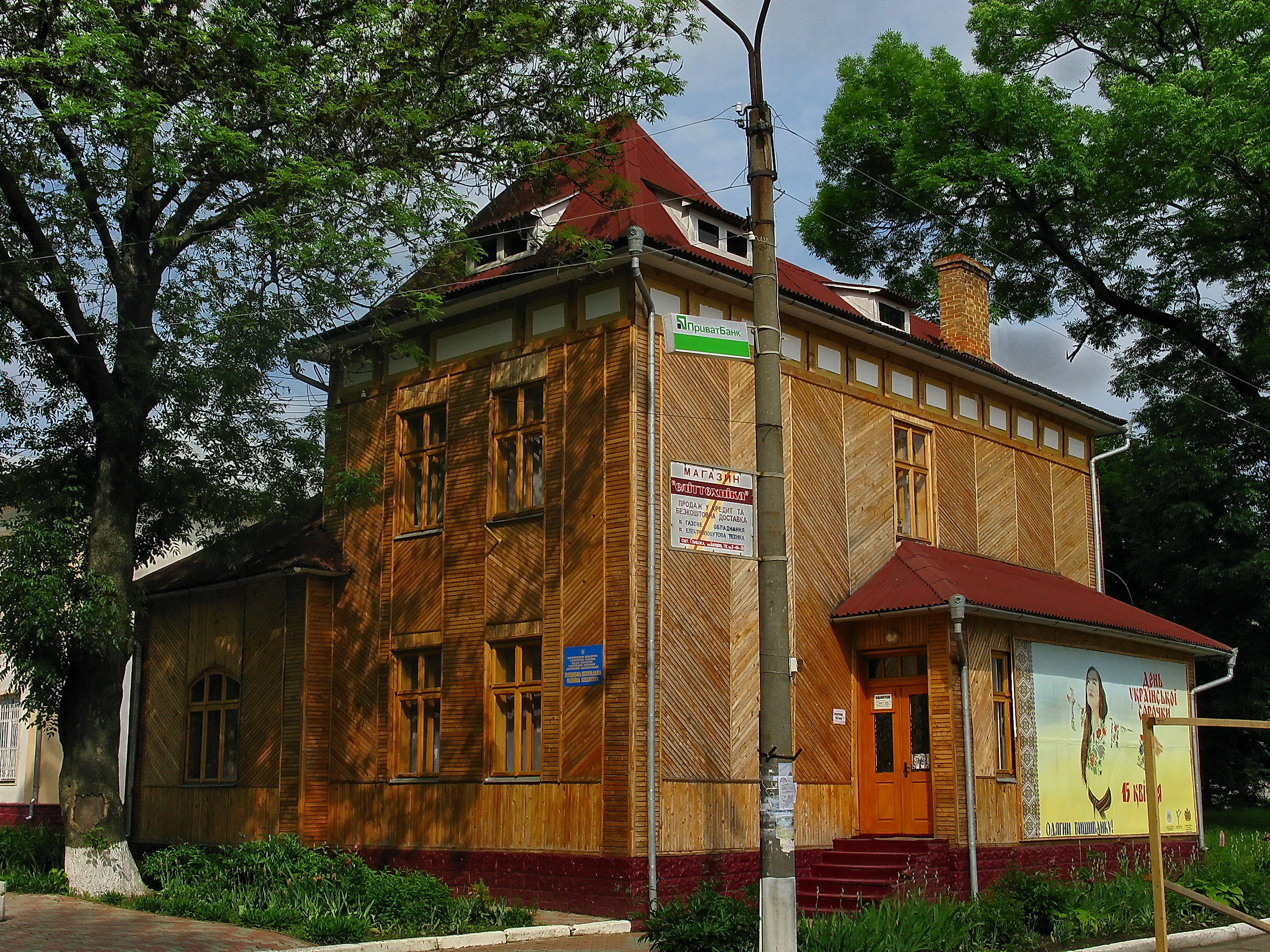 Будинок - зразок традиційної народної архітектури, смт. Глибока, вул. Центральна, 85